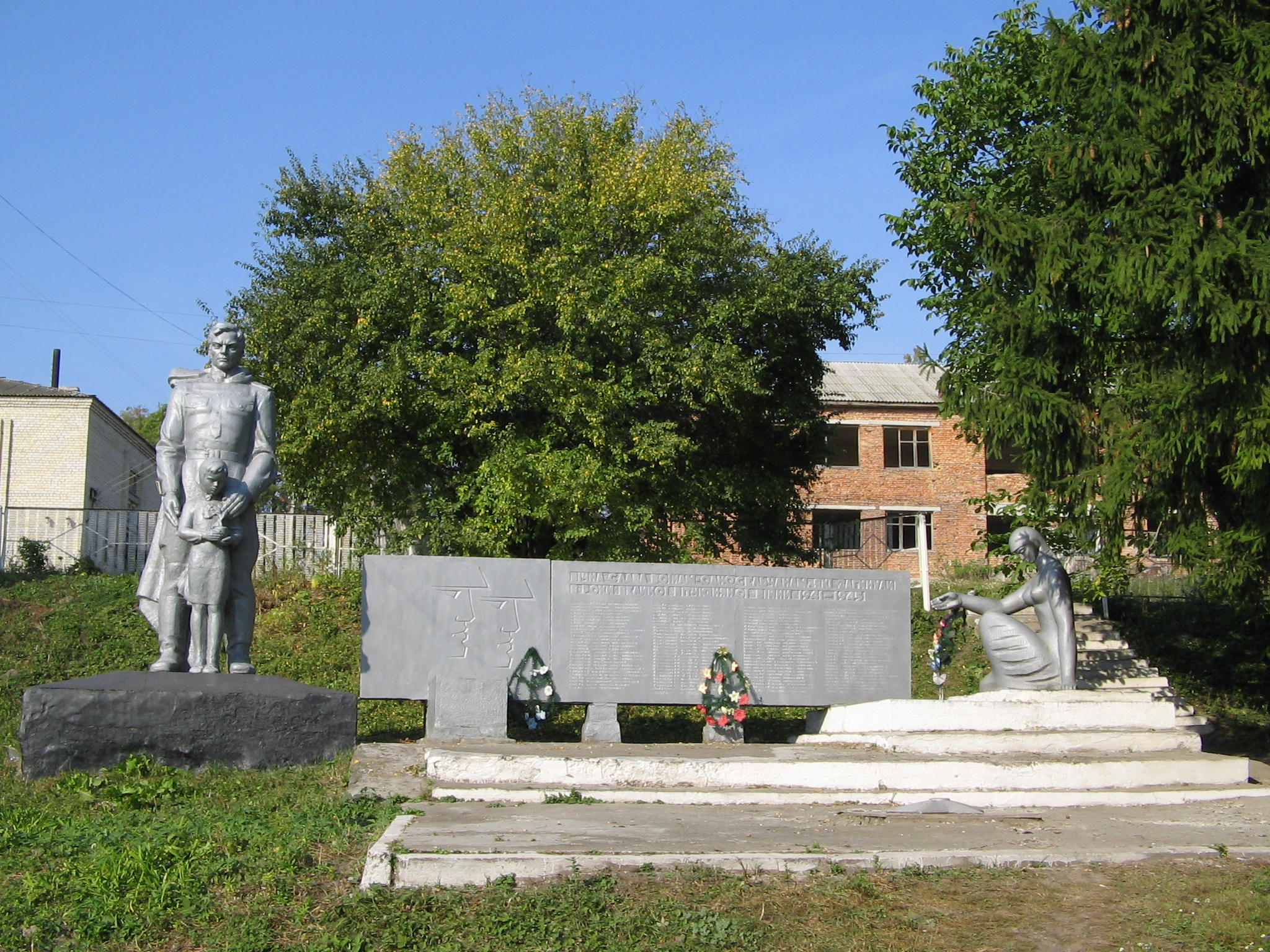 Пам'ятний знак на честь воїнів-односельчан, Теофіпольський район, с. Гаврилівка вул. Колгоспна